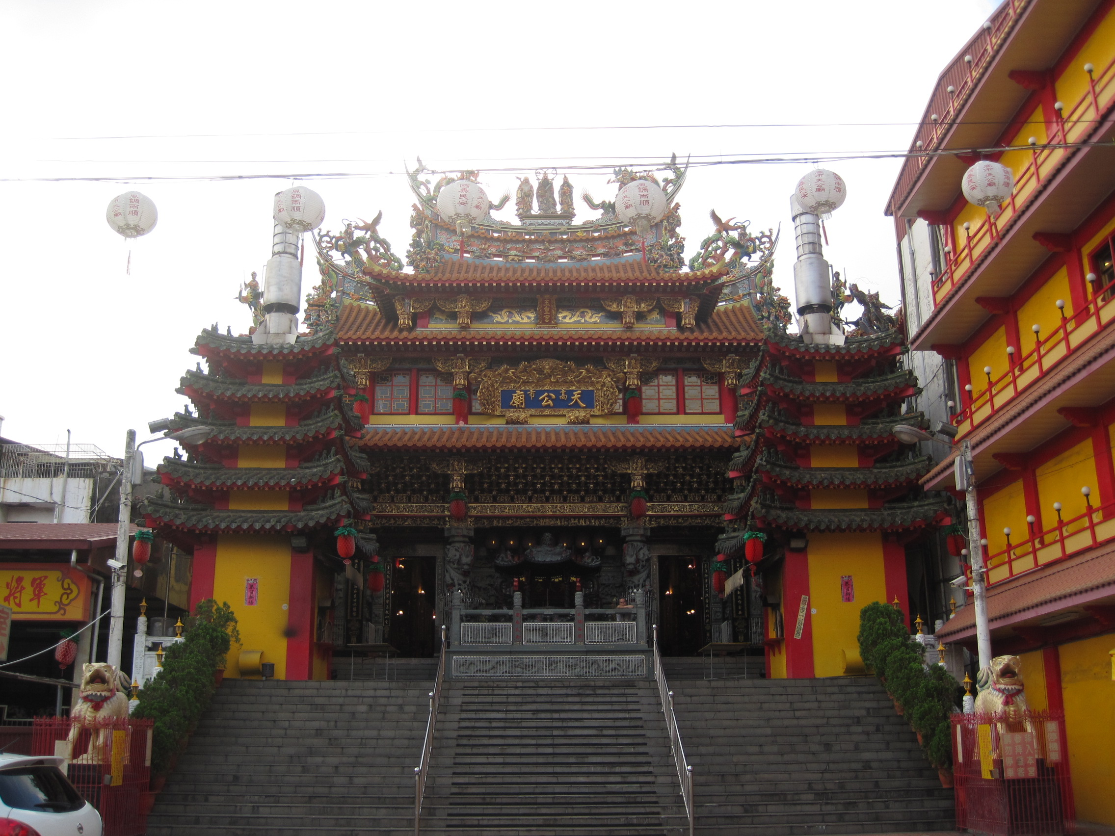 高雄玉皇宮